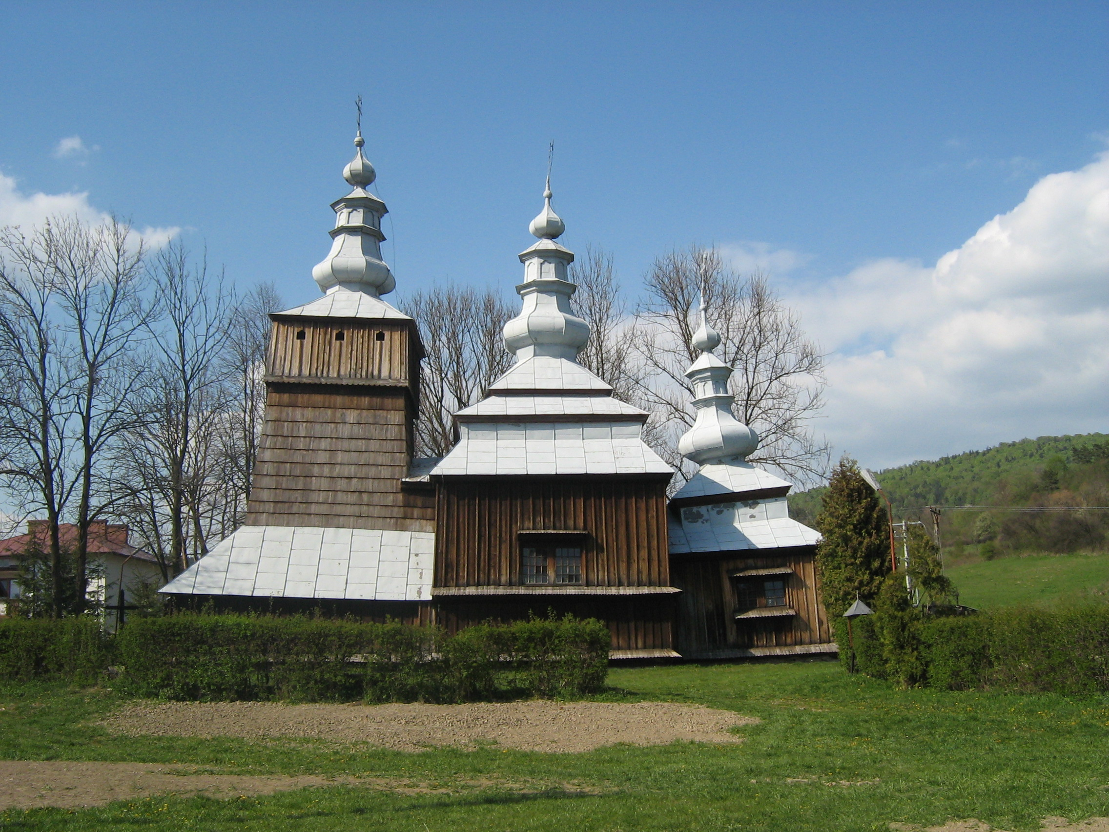 Cerkiew w Krempnej (Beskid Niski).